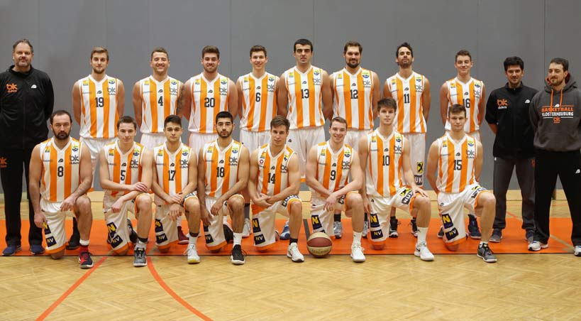 Teamfoto BK Klosterneuburg Dukes